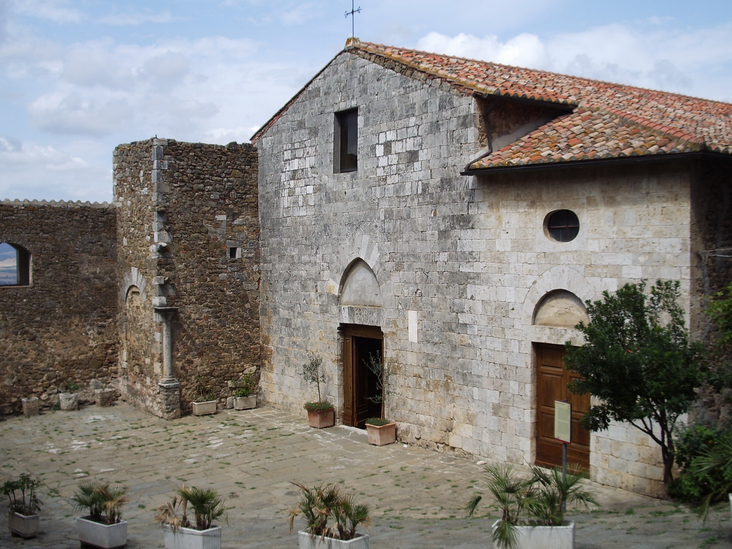 descrizione: Chiesa di San Giorgio a Montemerano (GR) lavoro personale di Vinattieri Matteo (27/01/2007 con foto scattata nell'agosto 2006) che lascia in pubblico domino